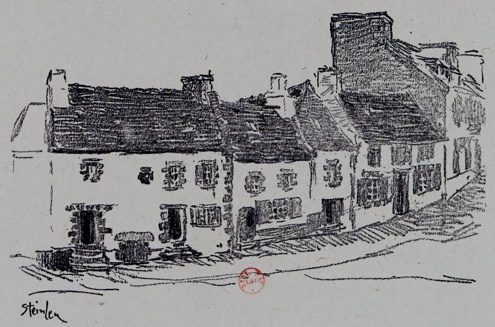 Le bourg breton de Plestin dessiné en 1902 par Théophile Alexandre Steinlen